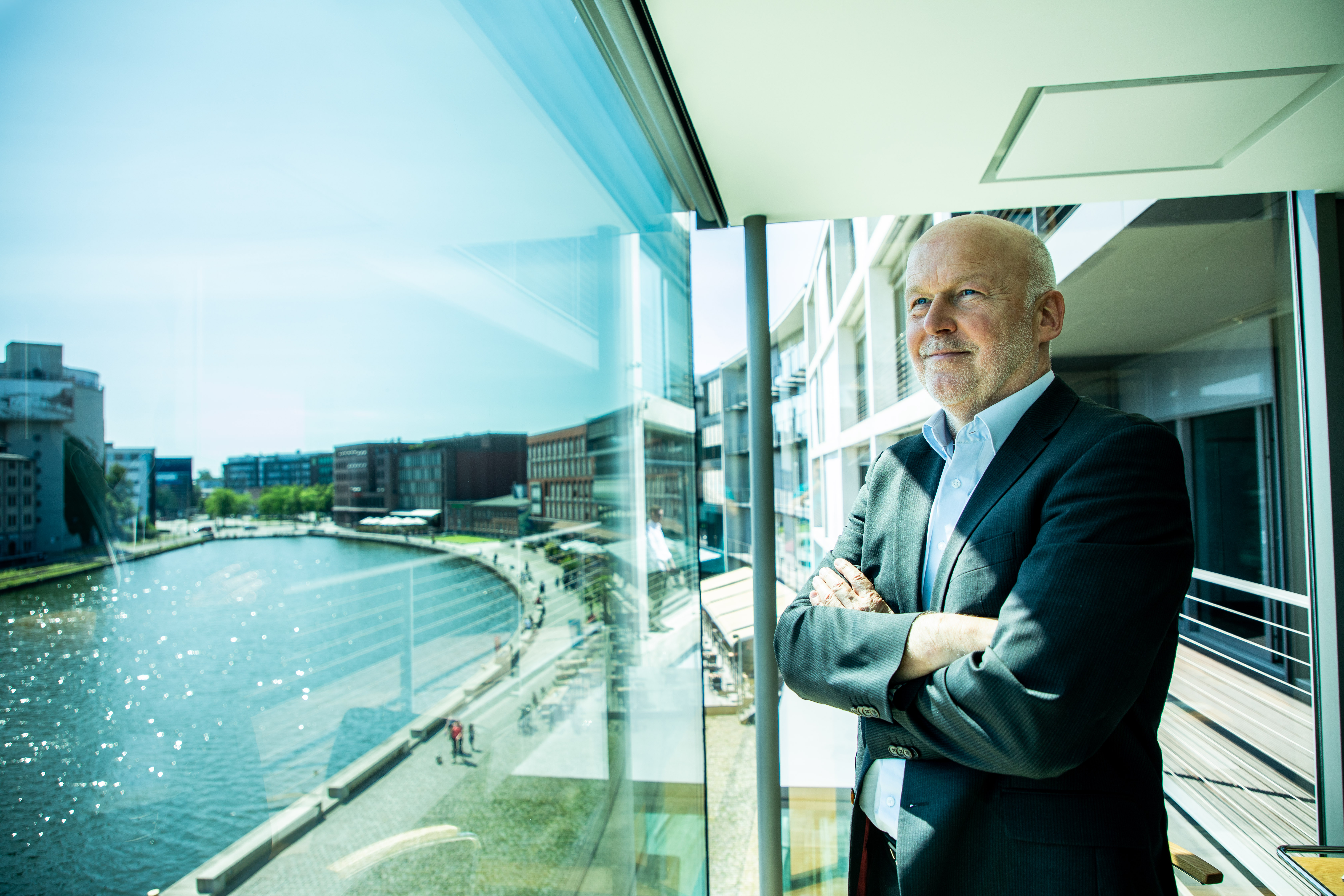 Prof. Dr. Andreas Schulte